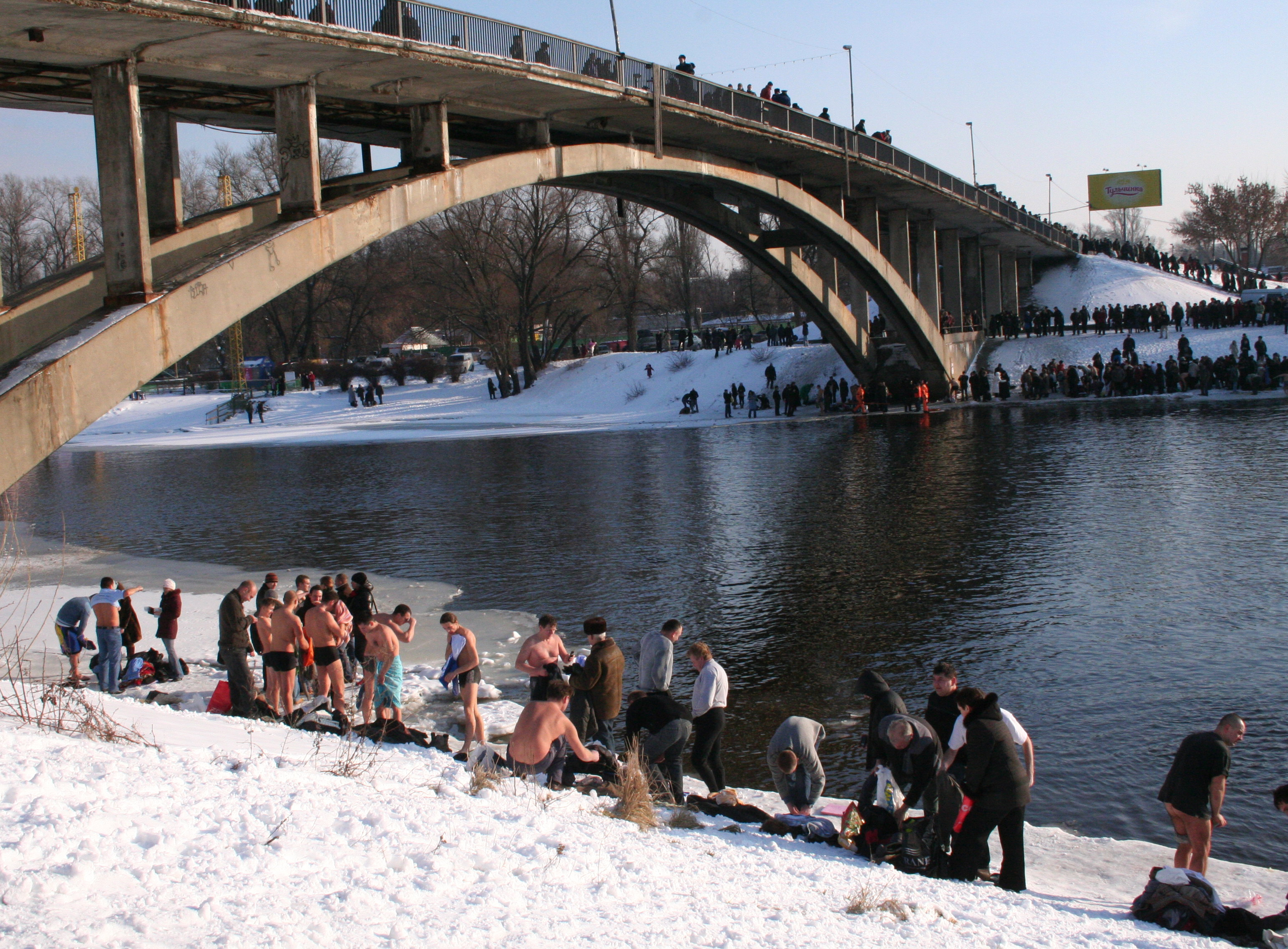 2015 рік